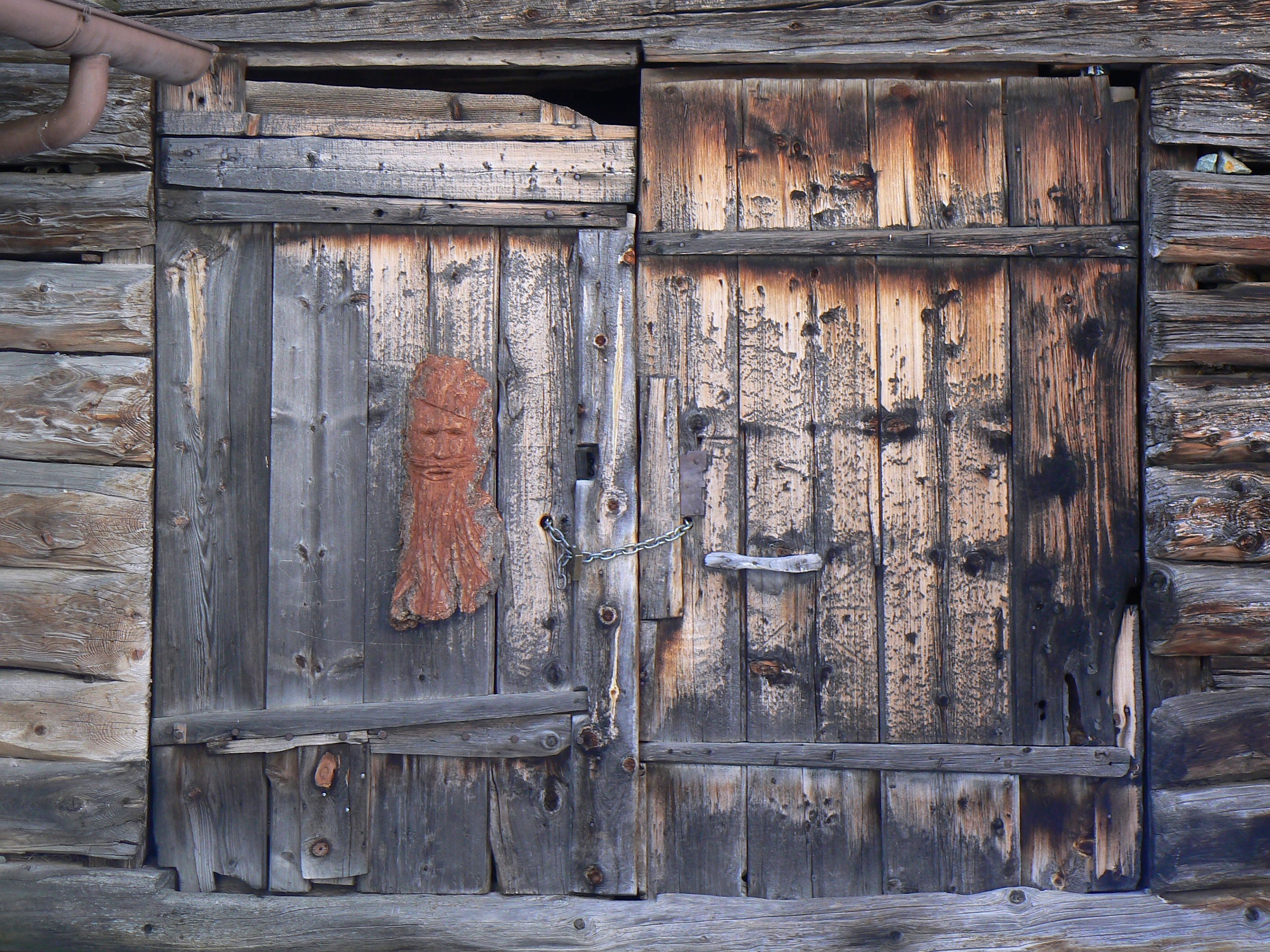 Villaggio di Nex, in Valsavarenche nel Parco nazionale del Gran Paradiso. Come il vicinissimo villaggio di Tignet è uno dei pochi vllaggi conservatisi integri dal basso medioevo, tra i maggiori esempi valdostani di architettura alpina tradizionale. Comune di Valsavarenche, Valle d'Aosta, Italia. This is a photo of a monument which is part of cultural heritage of Italy.